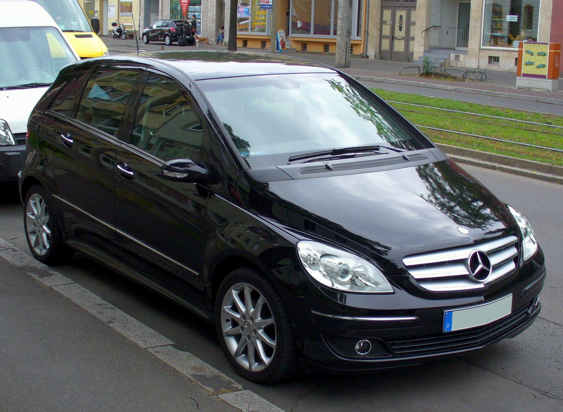 Mercedes-Benz B-Klasse